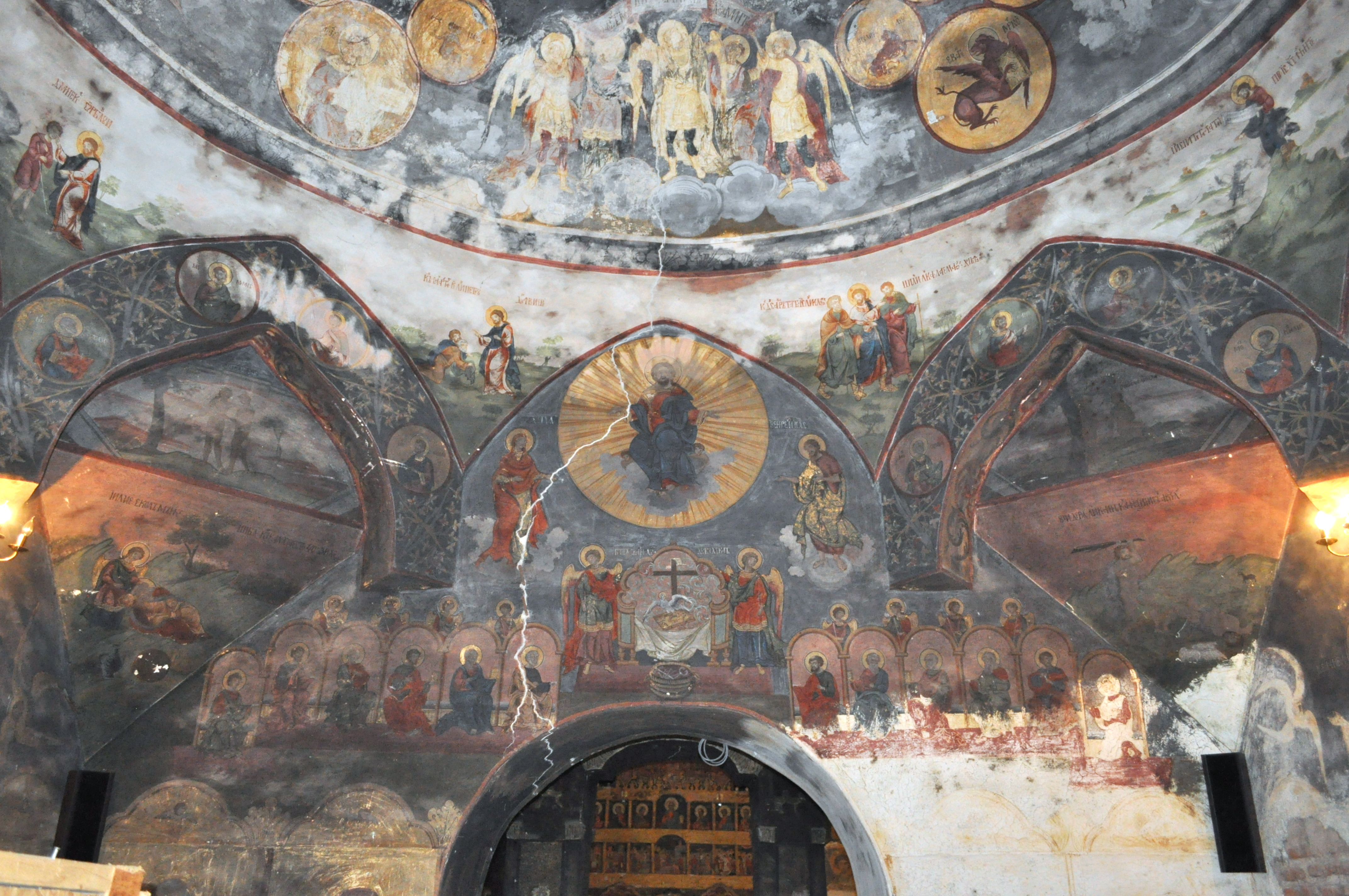 Biserica „Sfânta Treime”, sat Cerneți; comuna Șimian